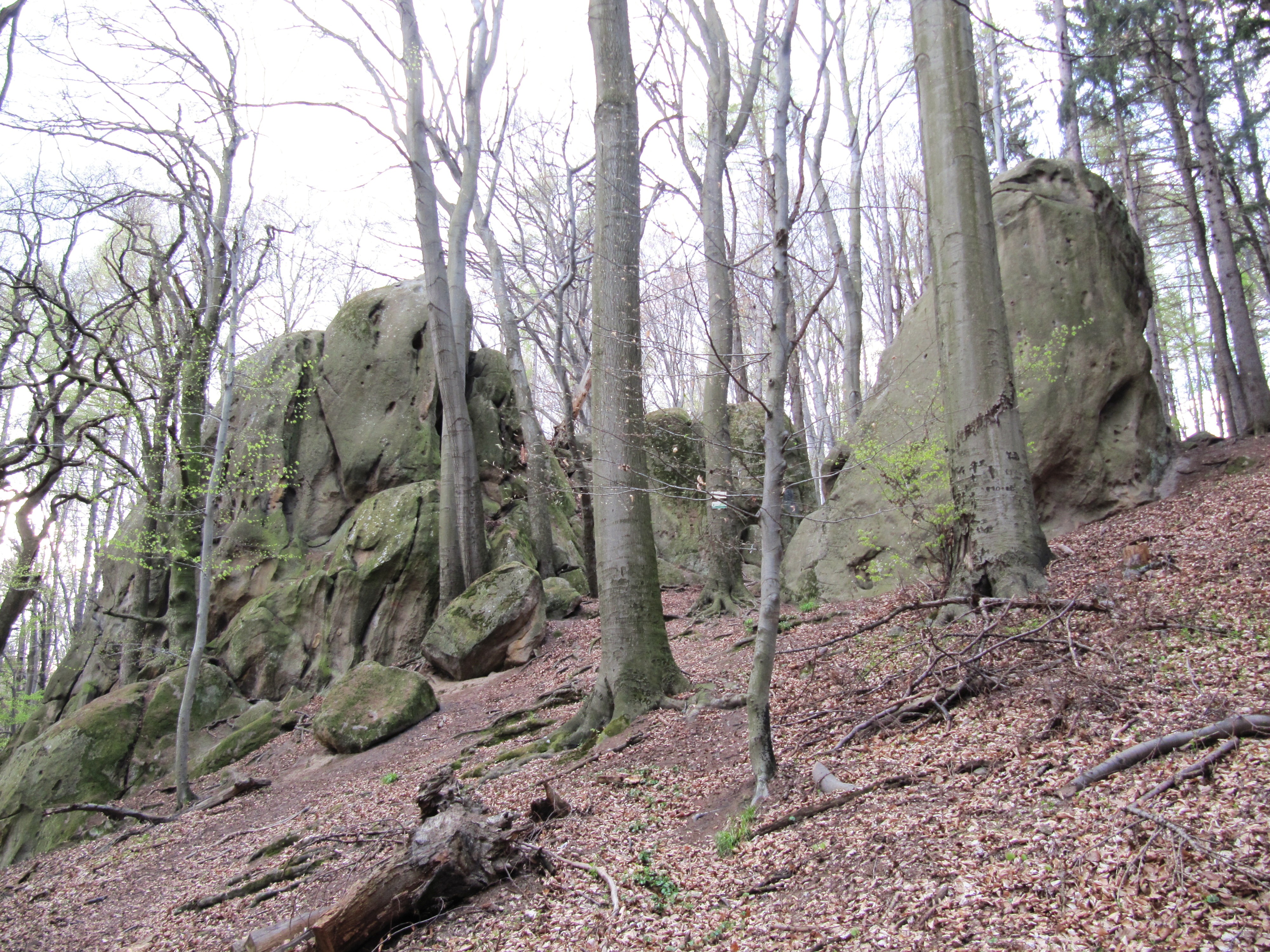 Budačina